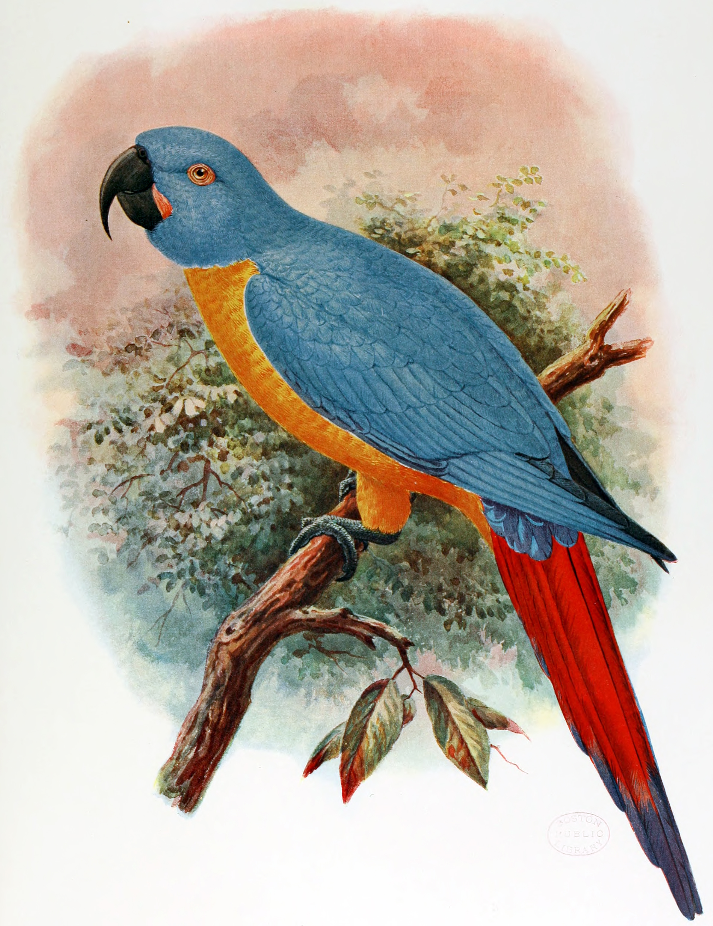 Ara Erythrura